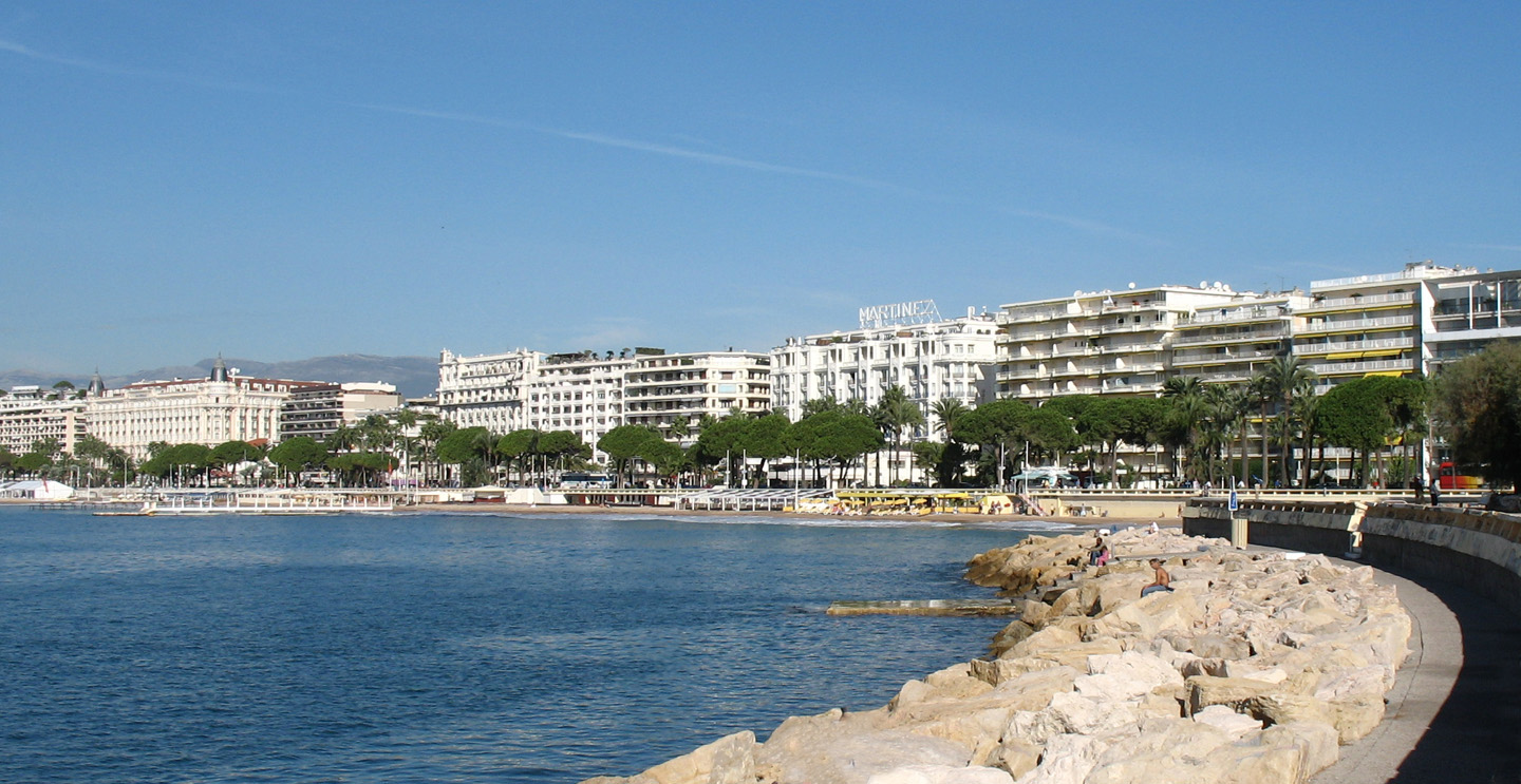 Cannes, la Croisette, France